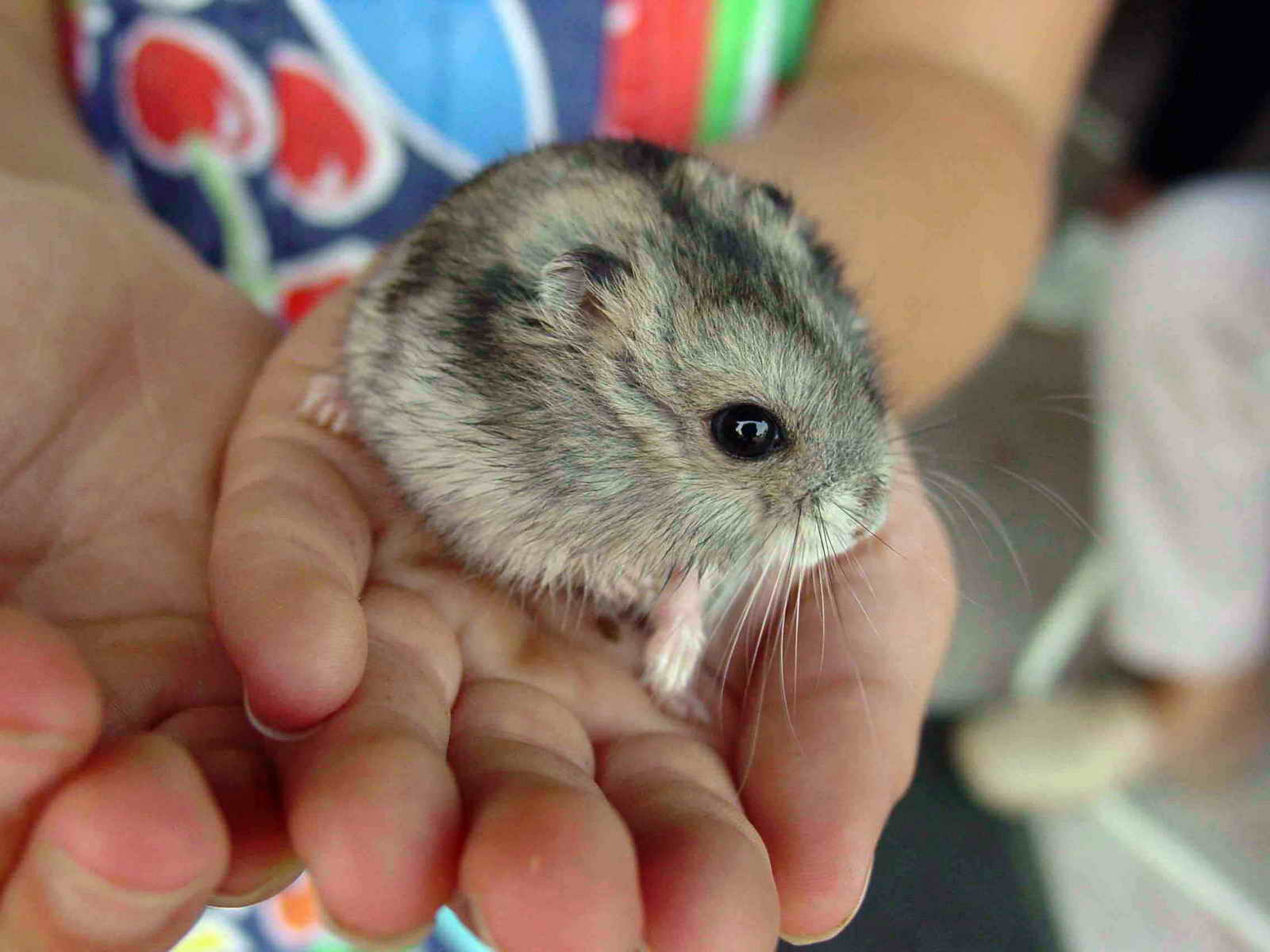 Foto tirada cunha Nikon E8800